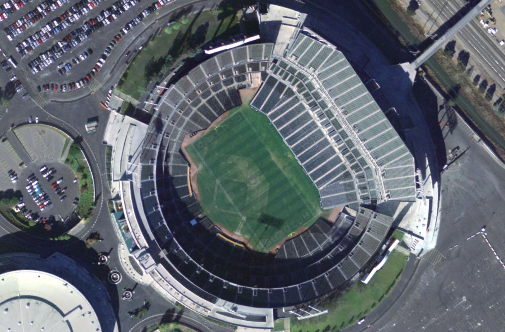 nasa world wind 1.3.5